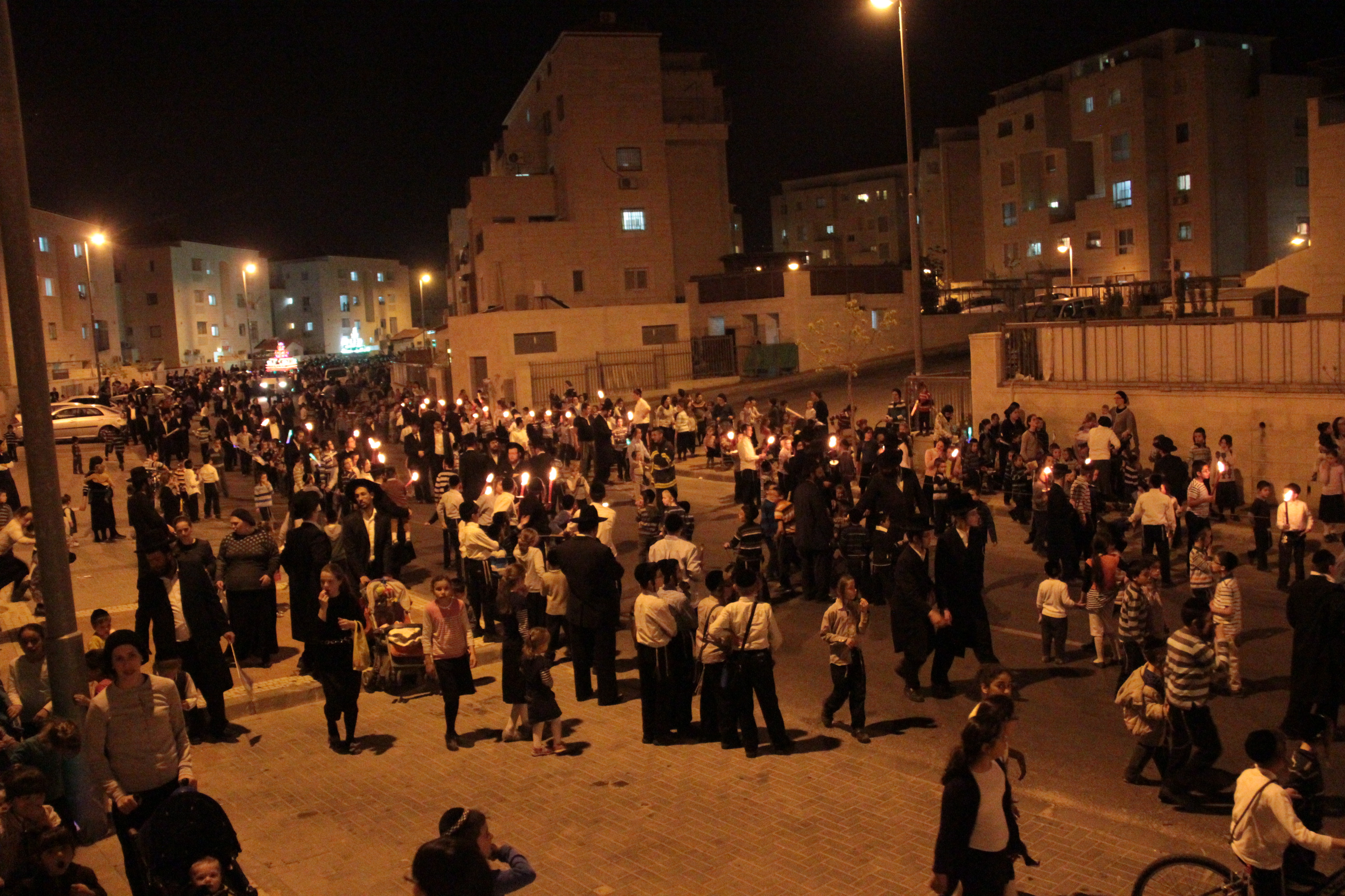 Sefer Torah in memory of Rabbi Shlomo Shtenzel in Beitar Illit Featuring Rabbi Asher Weiss Rabbi yonatan Shtencel